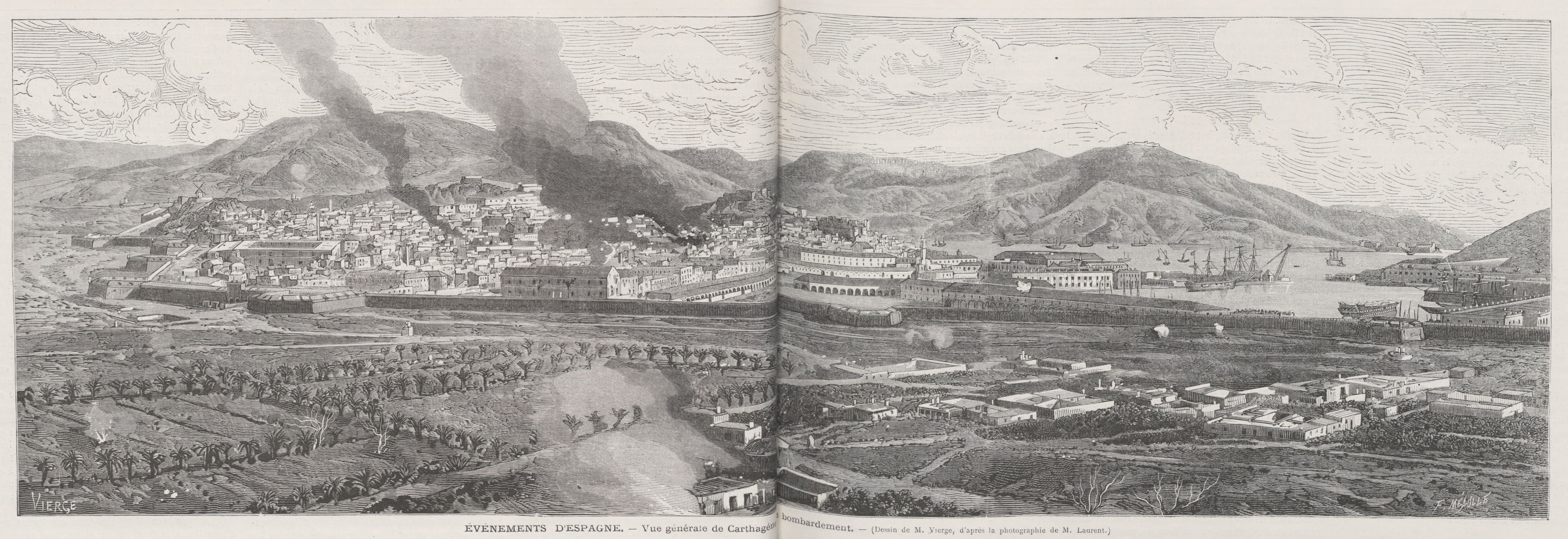 Événements d'Espagne, vue générale de Carthagéne, bombardement (Dessin de M Vierge, d'après la photographie de M Laurent)